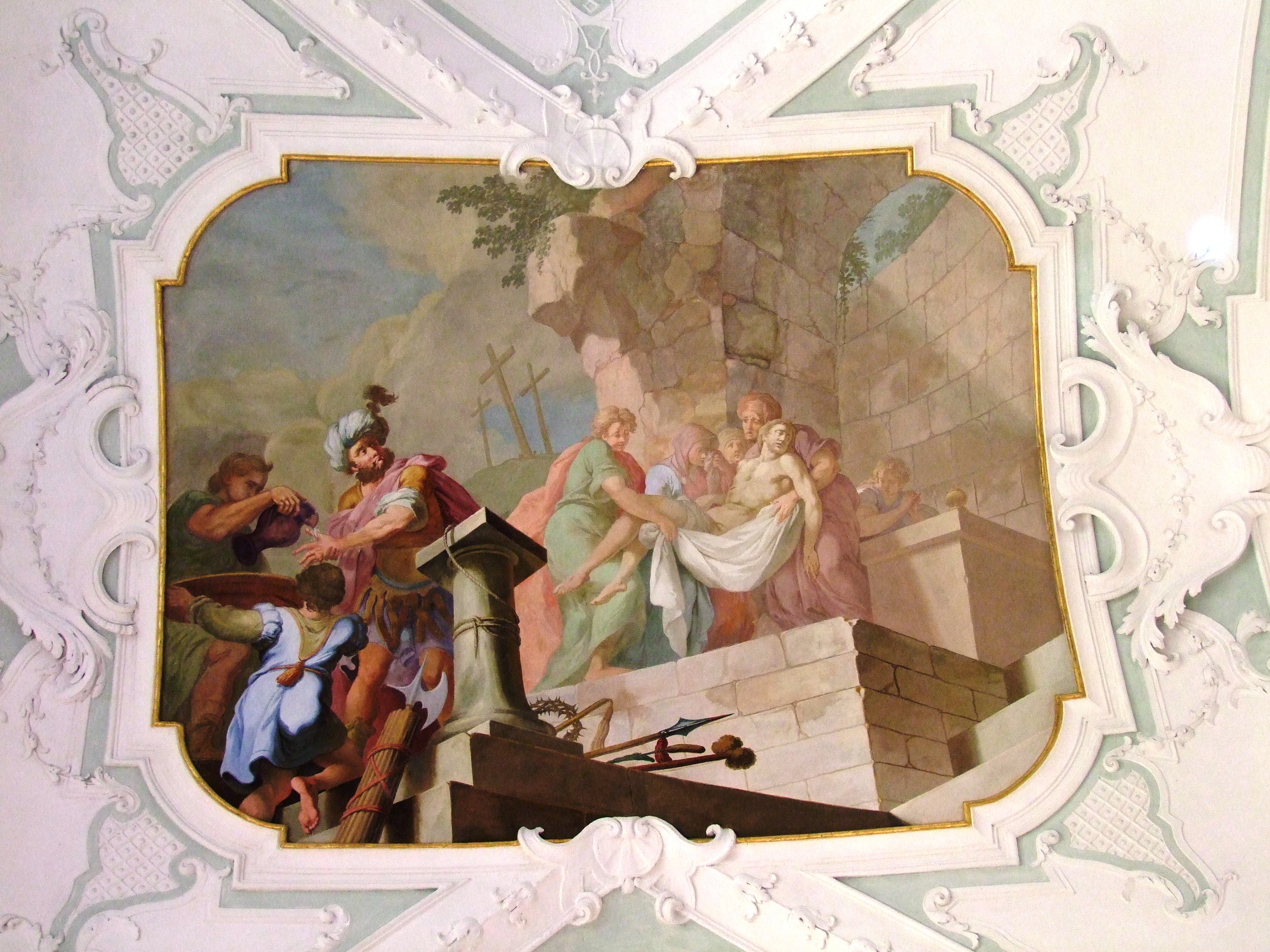 St. Georg, ehemalige Klosterkirche des oberschwäbischen Klosters Ochsenhausen